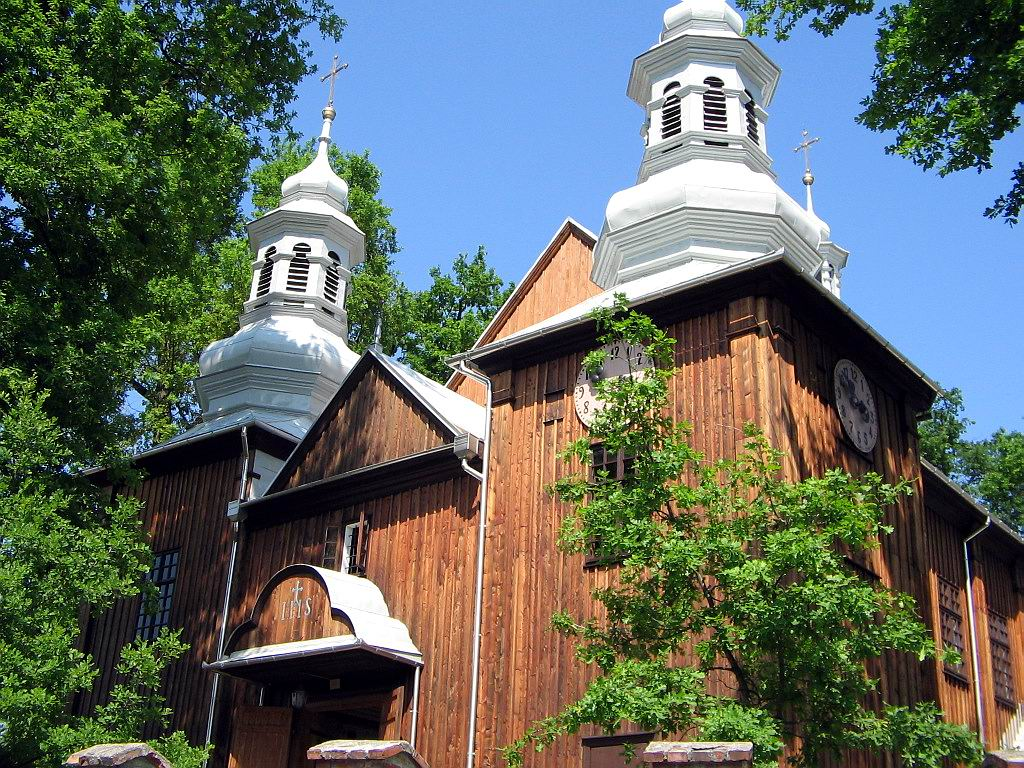 Kościół parafialny pw. Niepokalanego Poczęcia NMP we wsi Jasienica Rosielna